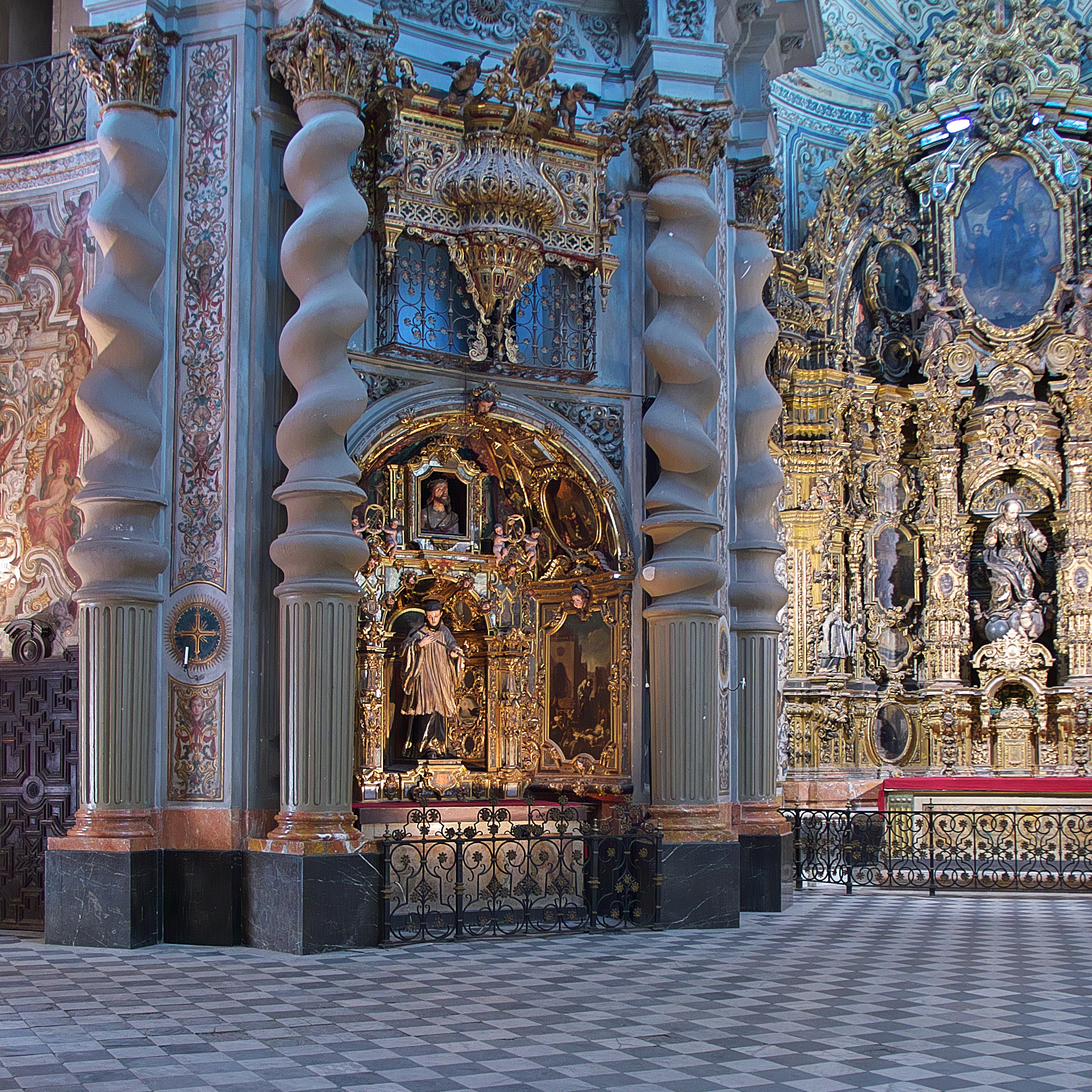 La Compañía de Jesús y Leonardo de Figueroa, reunieron en este templo, los mejores artistas del momento. Domingo Martínez, Juan Miguel Sanchez, Pedro Duque y Cornejo, Juan de Hinestrosa, etc.